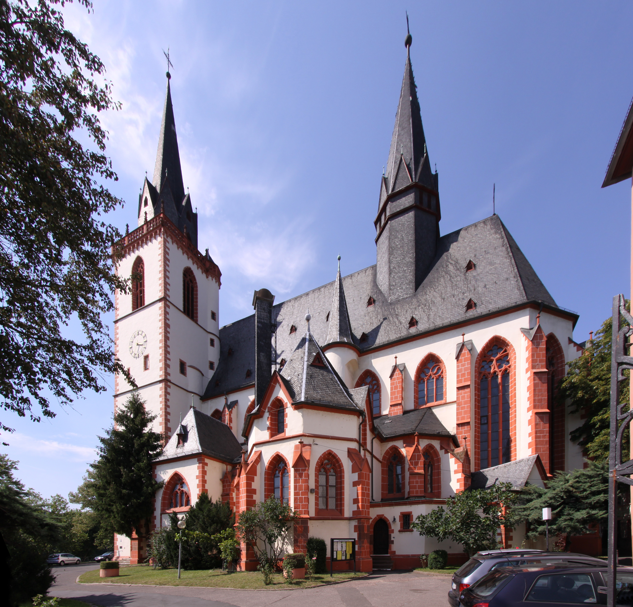 Ehemalige Stiftskirche, heutige Pfarrkirche St. Martin in Bingen am Rhein/Deutschland - Suedseite